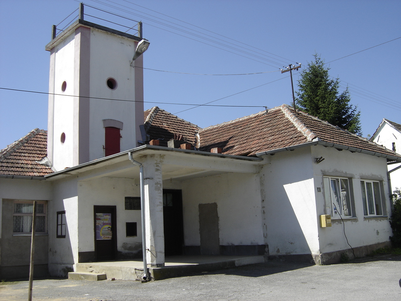 Nova Jošava, Vatrogasni dom